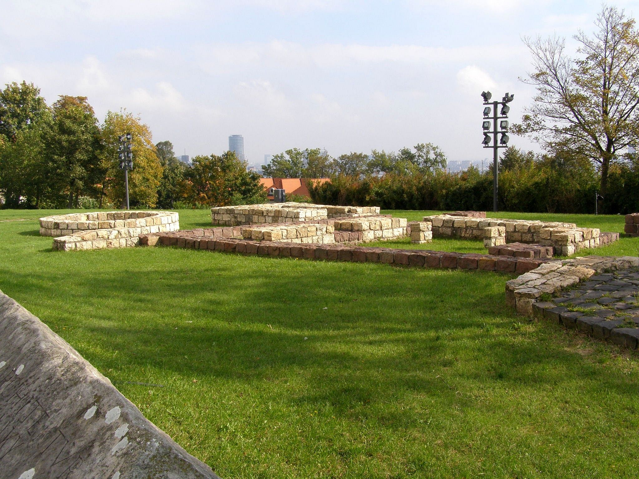 Rekonštruované základy objektov z 9. - 12. storočia na východnej terase hradu This medium shows the protected monument with the number 101-28/17 in the Slovak Republic.